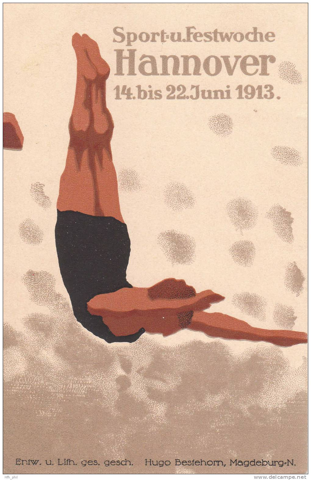 Bildseite der dem Hannoverschen Kurier (siehe umseitig) als Beilage zugegebenen Kunstpostkarte, die anläßlich der Einweihung des Neuen Rathauses in Hannover zur Sport- und Festwoche vom 14. bis 23. Juni 1913 herausgegeben wurde. Das lithografierte Motiv zeigt für die Sportart Wasserspringen einen stilisierten Turmspringer nach dem Absprung im freien Fall. Am Fuß der Postkarte weist ein Aufdruck auf die Rechte hin: „Entw. u. Lith. ges. gesch. - Hugo Bestehorn, Magdeburg-N.“ ...